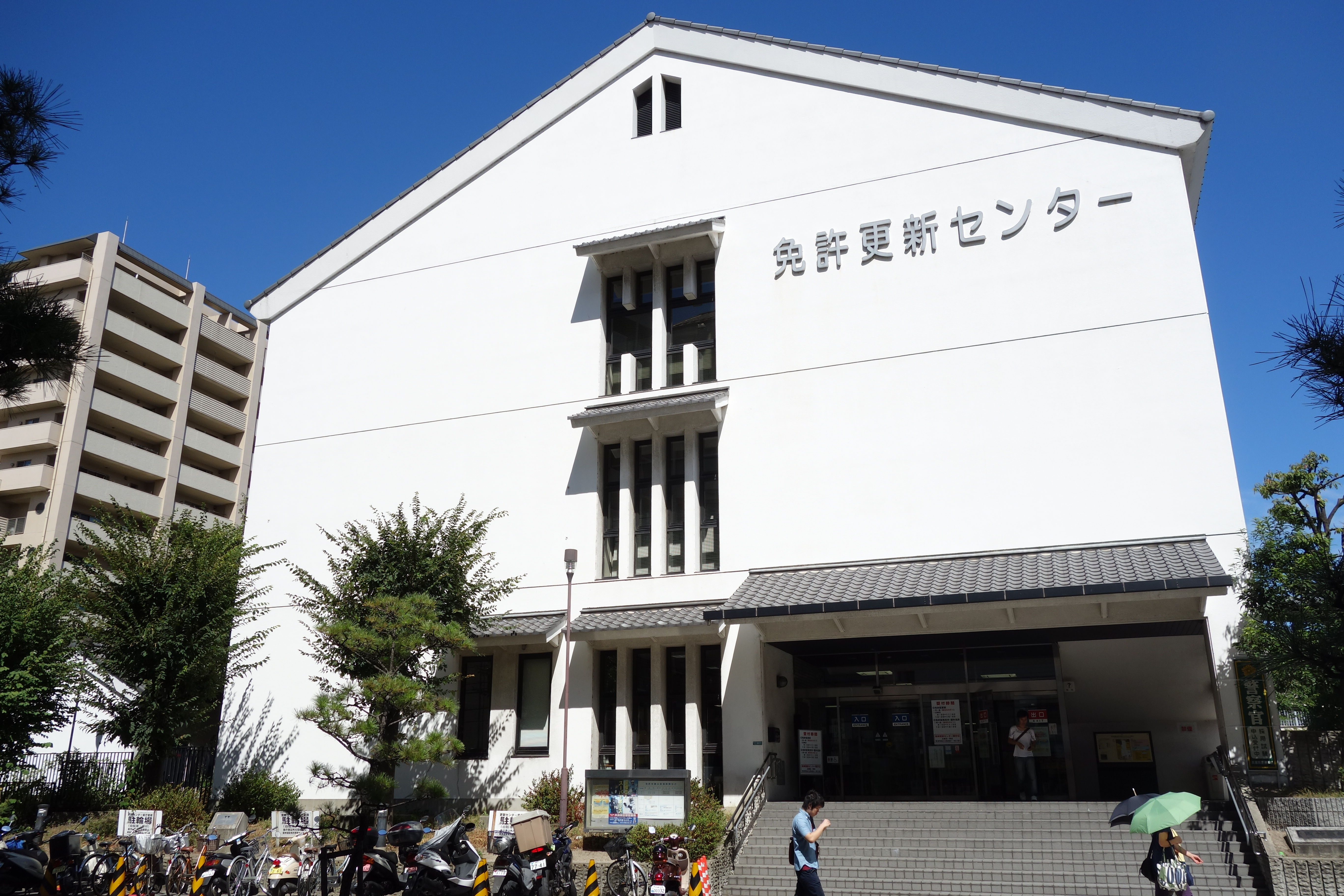 阪神運転免許更新センター （兵庫県伊丹市）